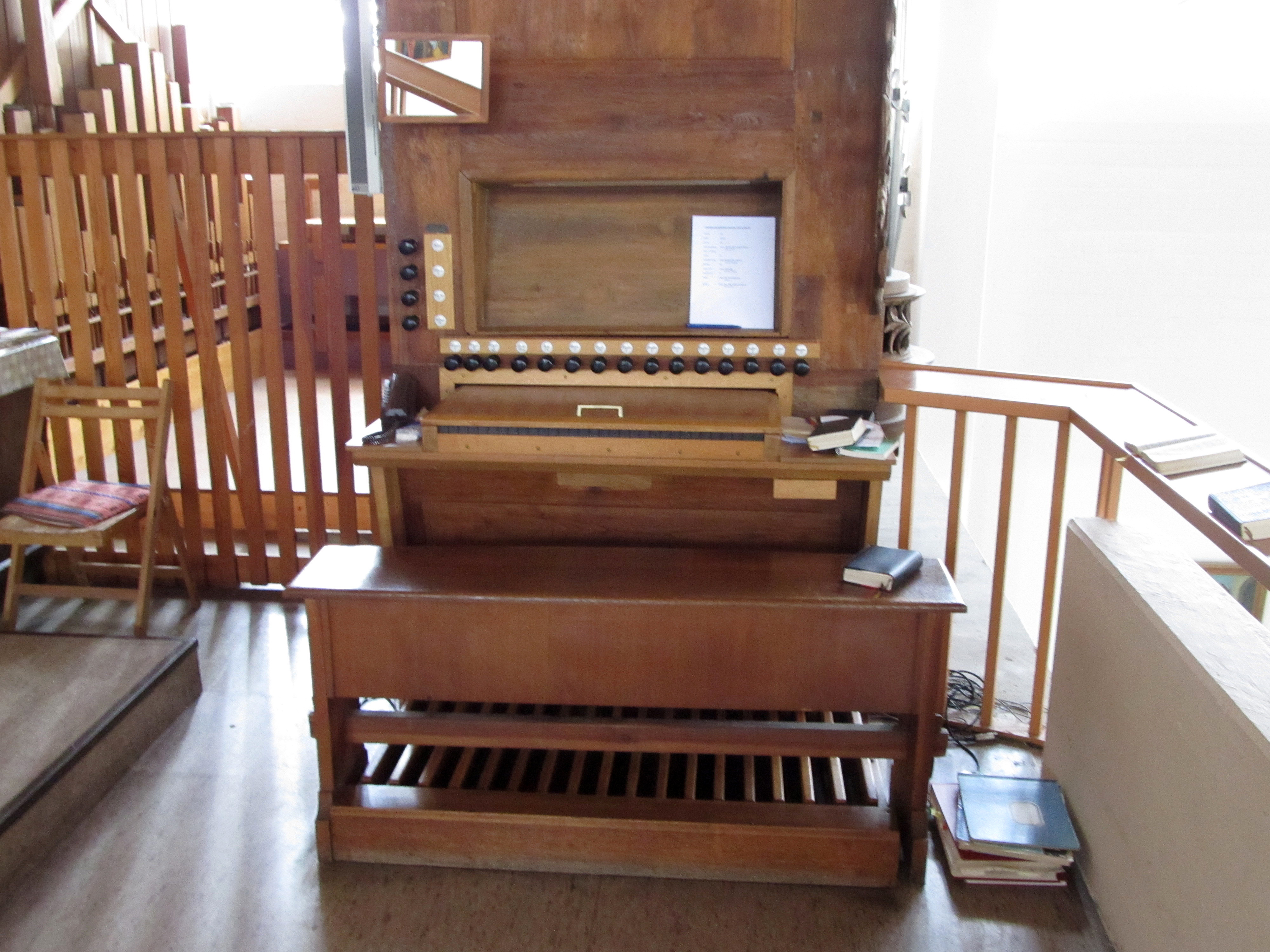 Die Orgel der katholischen Pfarrkirche Mariä Heimsuchung in Ommersheim, Saarland